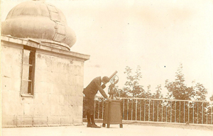 Observatoire2